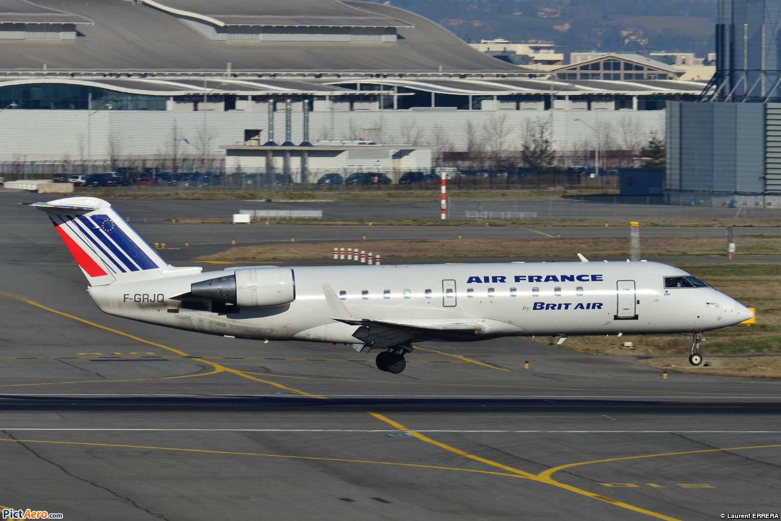 Photo prise à l'aéroport de Toulouse-Blagnac (LFBO) en France. Picture take at Toulouse-Blagnac Airport (LFBO) in France.